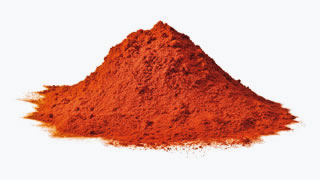 Pimentón Tap de Cortí